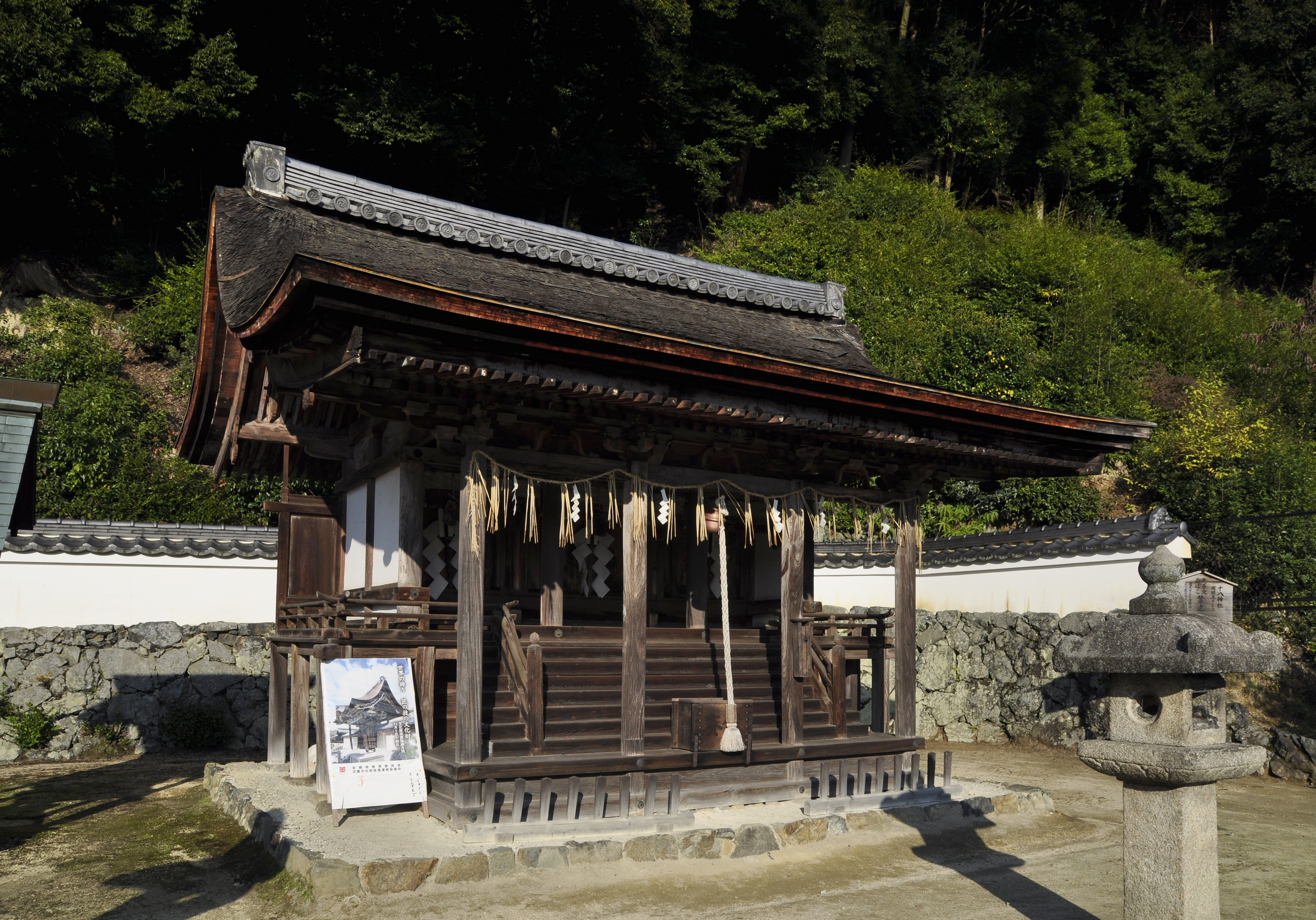 明星山三室戸寺十八神社本殿